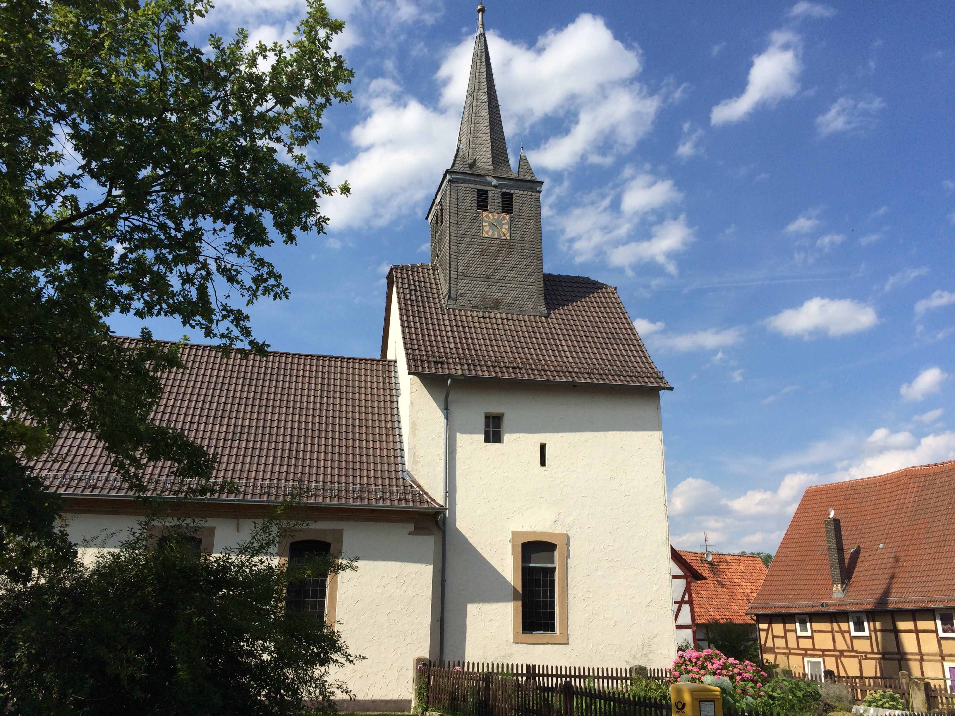 Die Evangelische Kirche in Viesebeck an der Landauer Straße